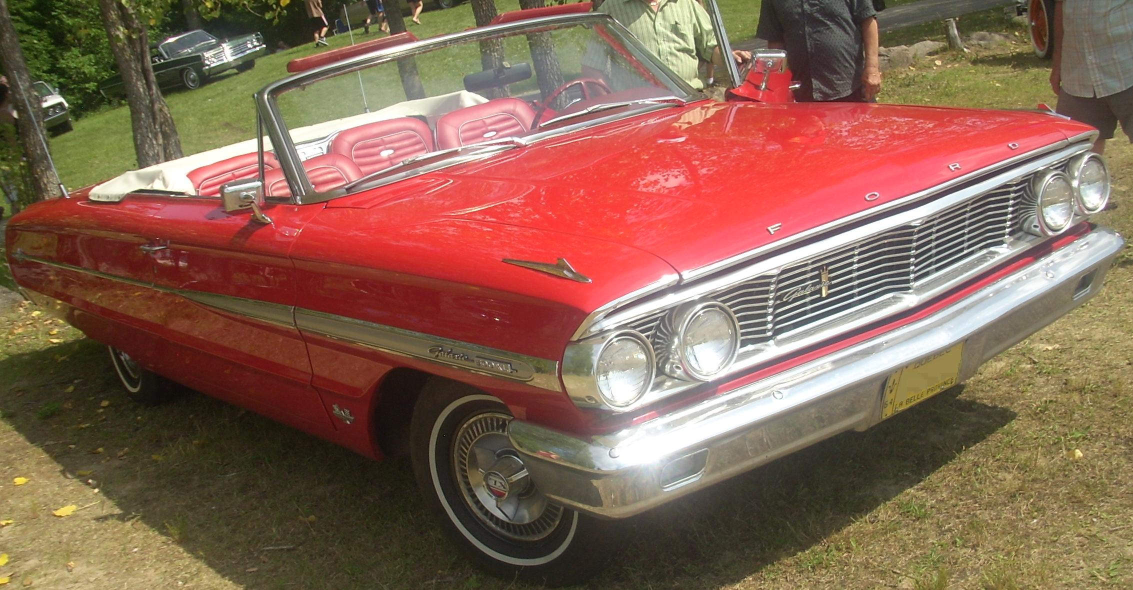 1964 Ford Galaxie 500 photographed in Laval, Quebec, Canada at Auto classique Laval 2010.